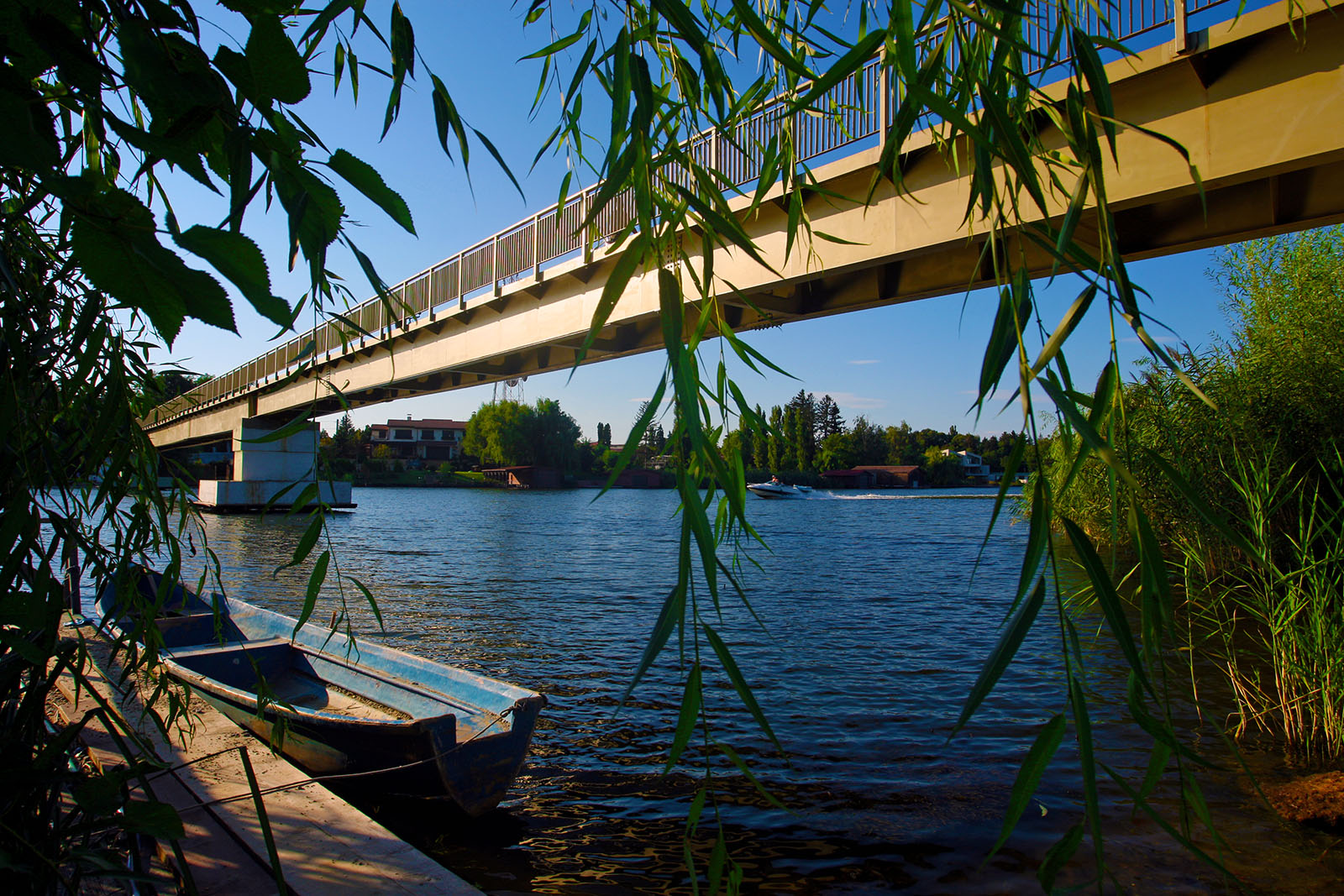 Pasarela pietonala spre manastirea Snagov